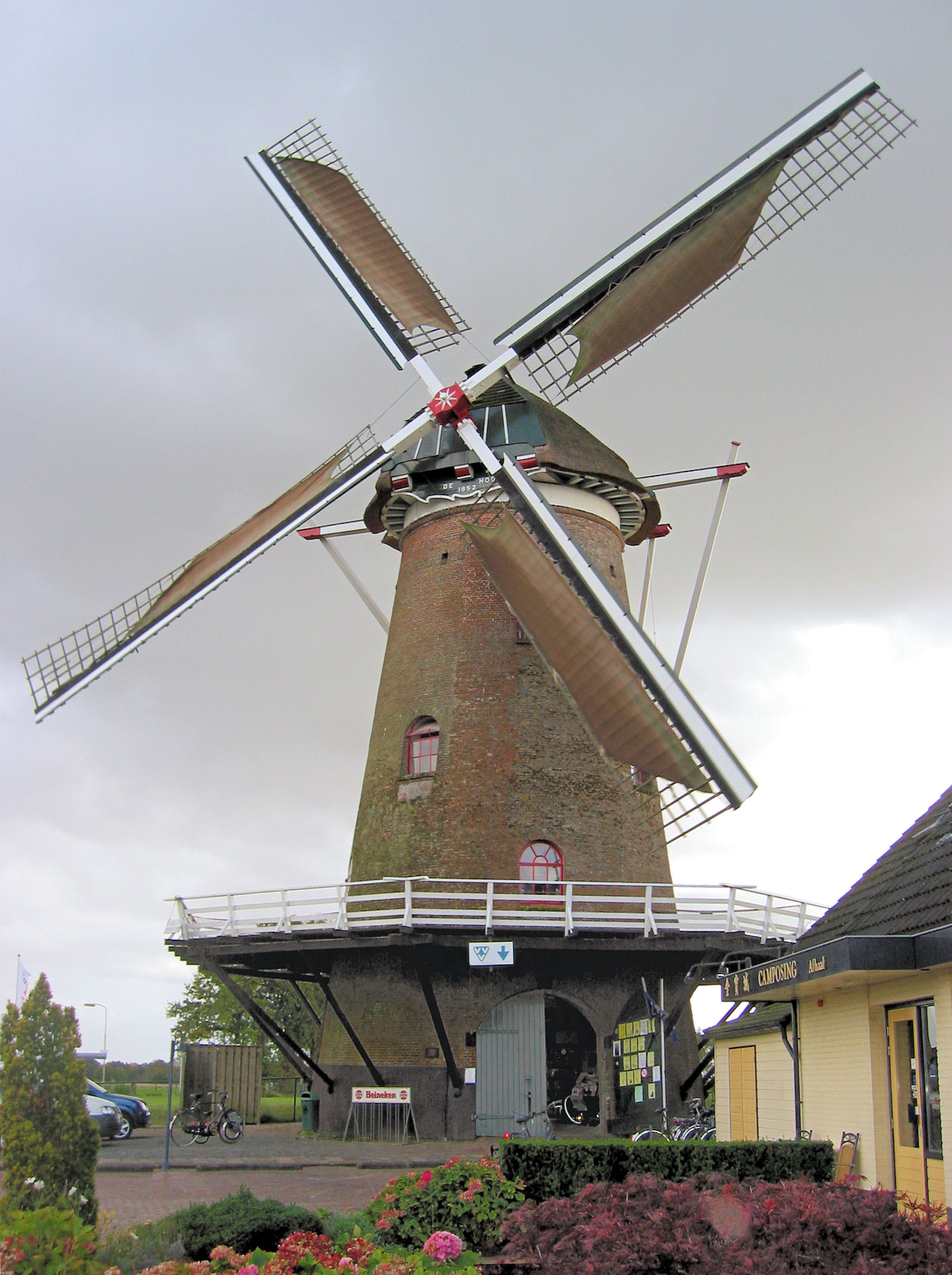 De Hoop in Garderen, 2 duikers en 2 halve, Gelderland, the Netherlands